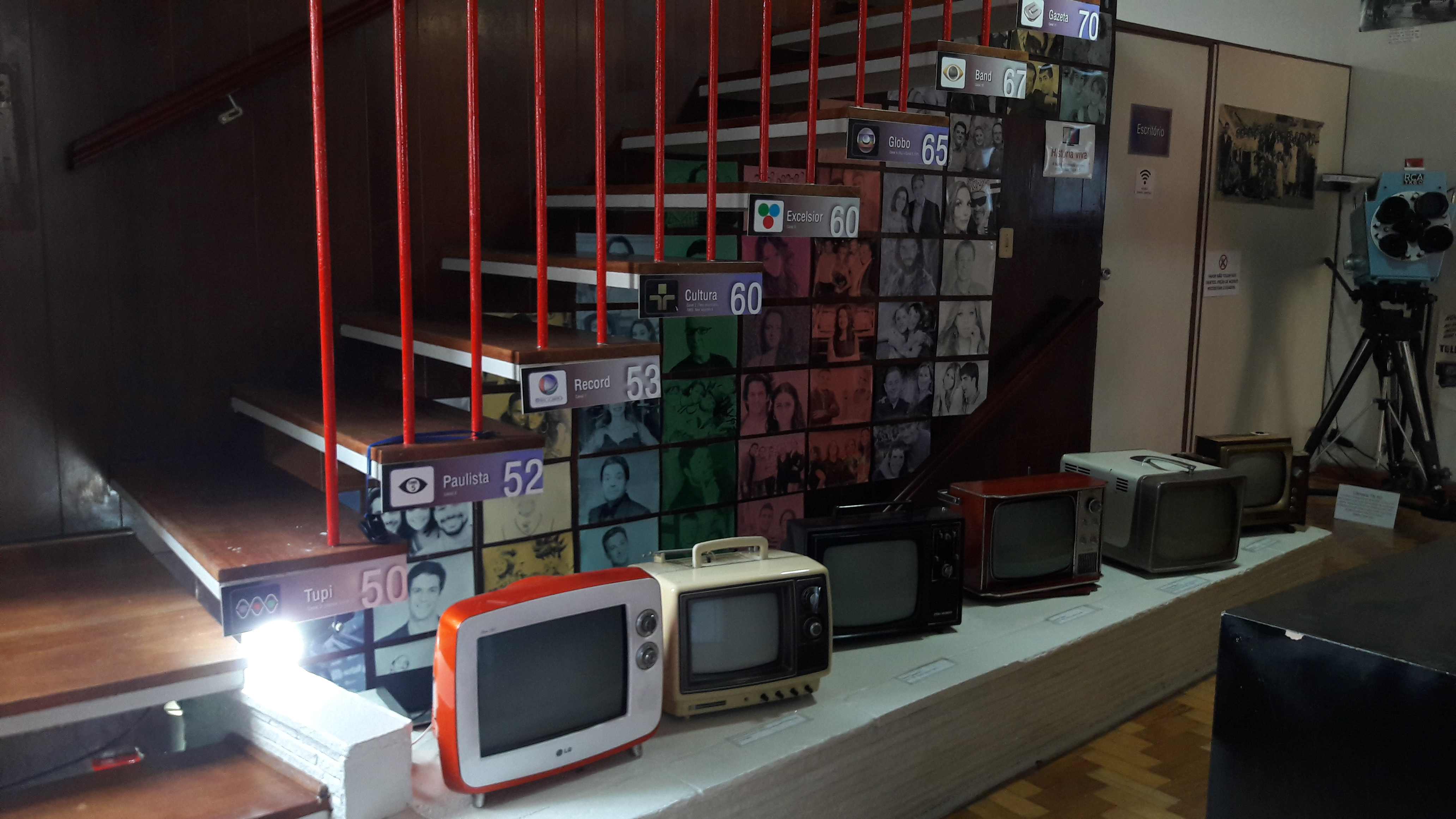 Linha do tempo e evolução das televisões brasileiras do Museu da TV